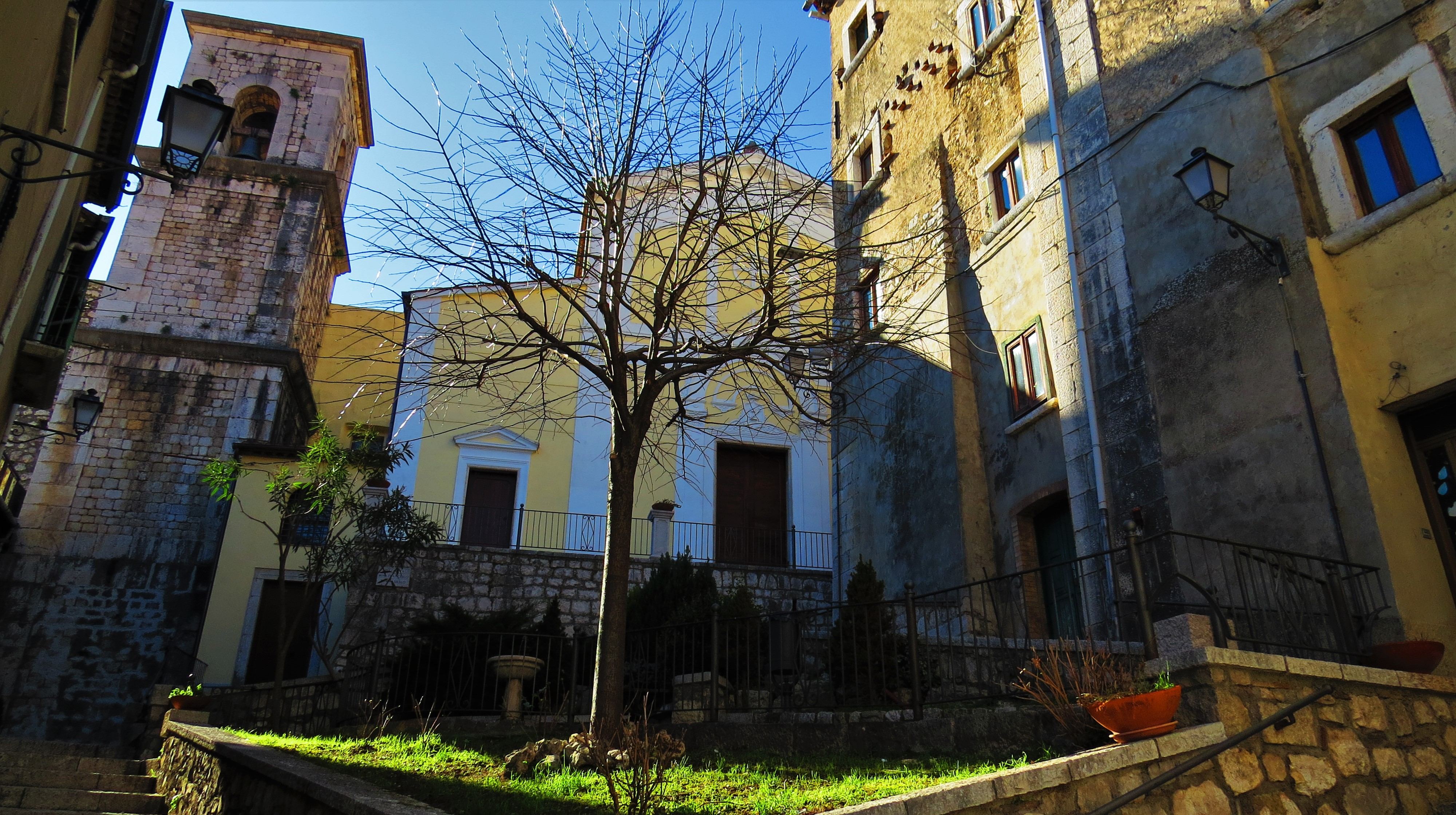 Cusano Mutri (BN)